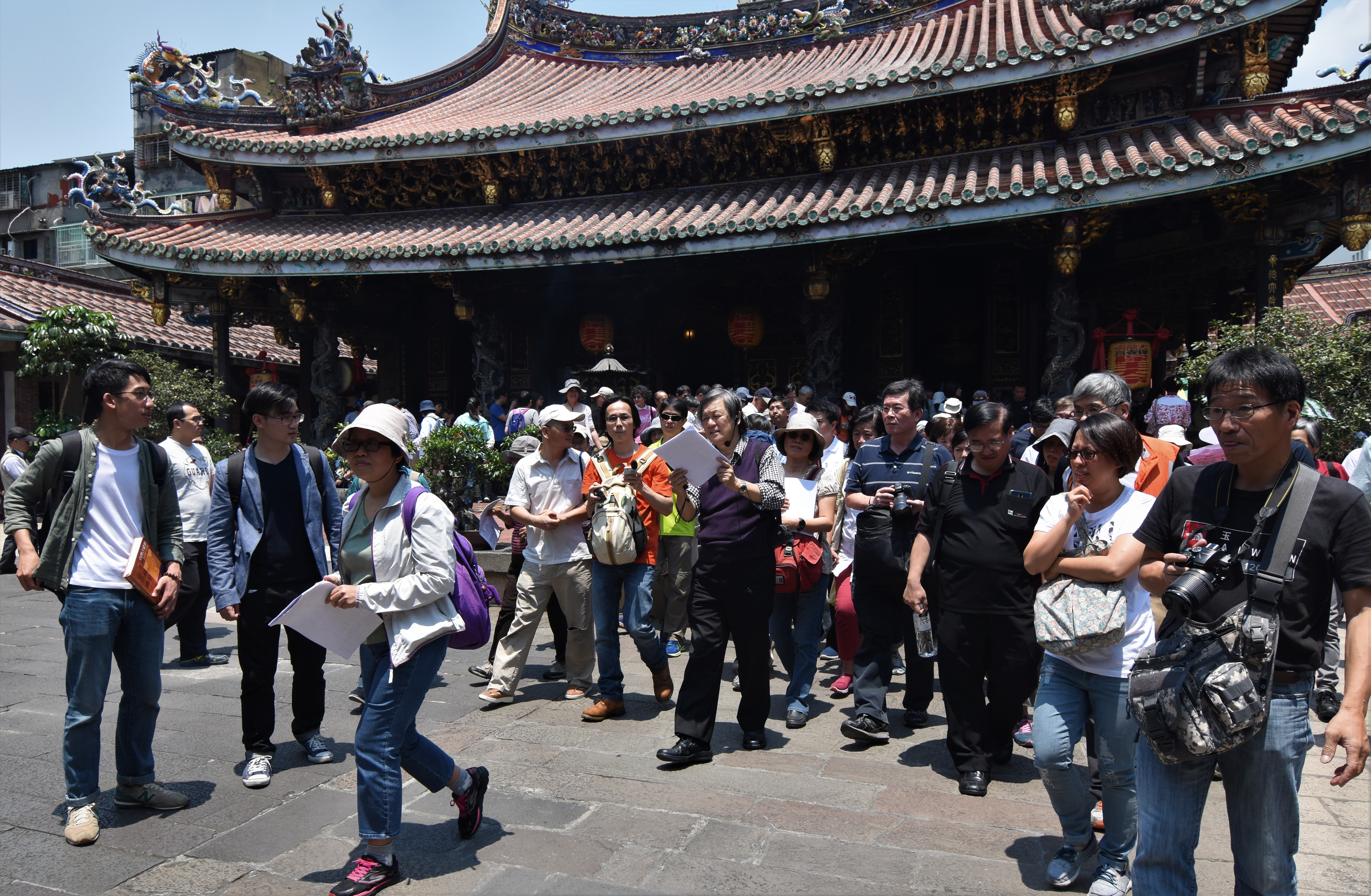 中文（台灣）: 大龍峒保安宮專家古蹟導覽